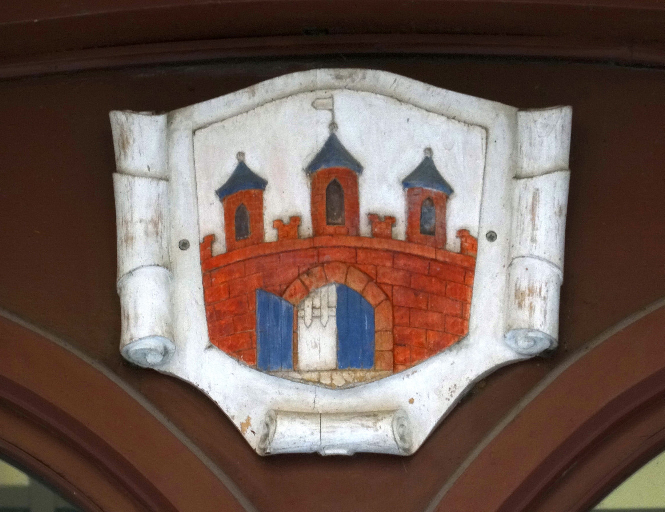 Ratusz w Bydgoszczy, dawne kolegium jezuickie (XVII w.). Detale architektoniczne na fasadzie od ul. Jezuickiej